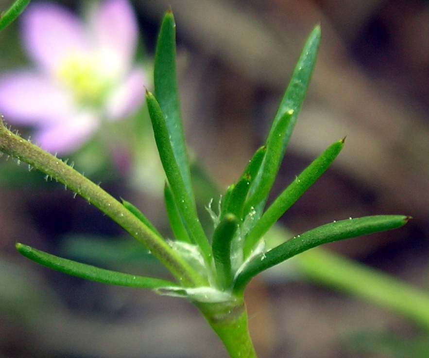 Rausvoji posmiltė, lapo viršūnėlė su spygleliu Šeima. Gvazdikiniai (Caryophyllaceae) Foto: Algirdas, 2006 m. birželio 3 d.